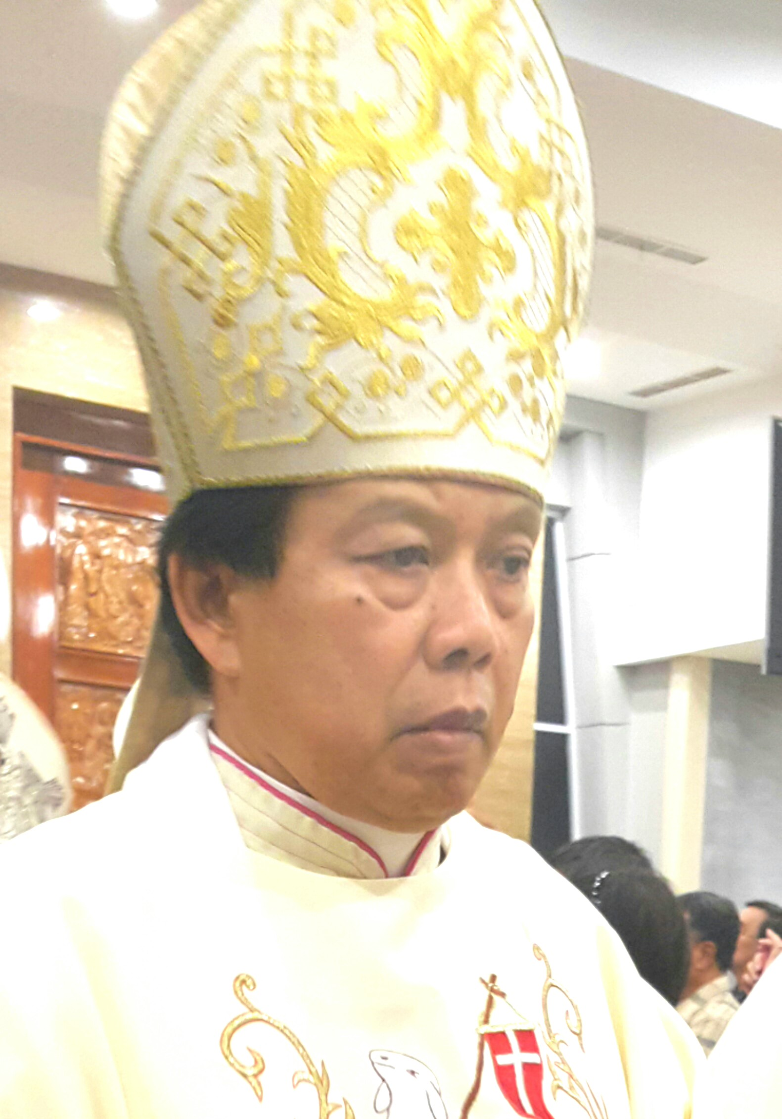 Mgr Vincentius Sutikno Wisaksono, Uskup Surabaya